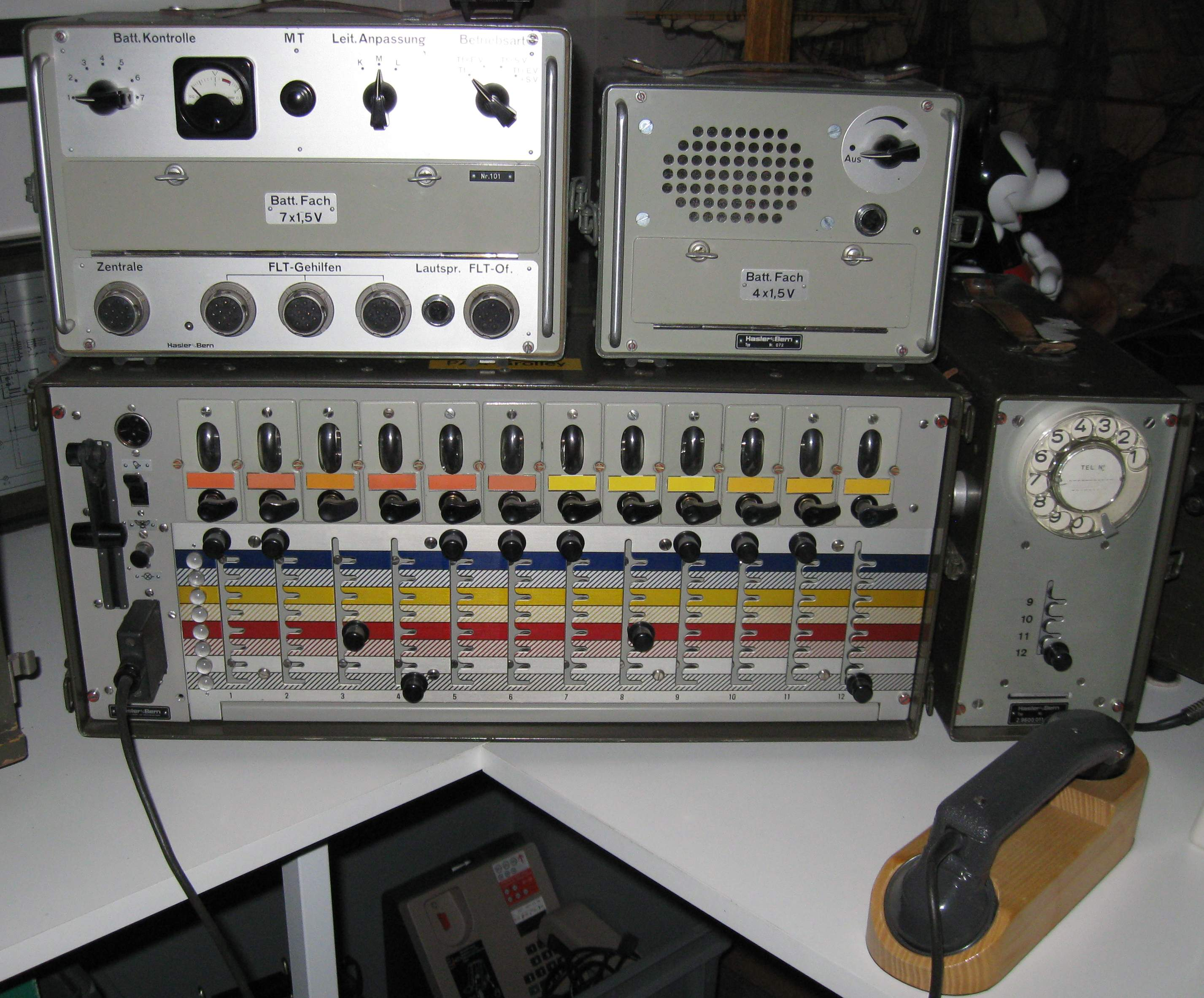 Feldtelefonzentrale 57 der Schweizer Armee